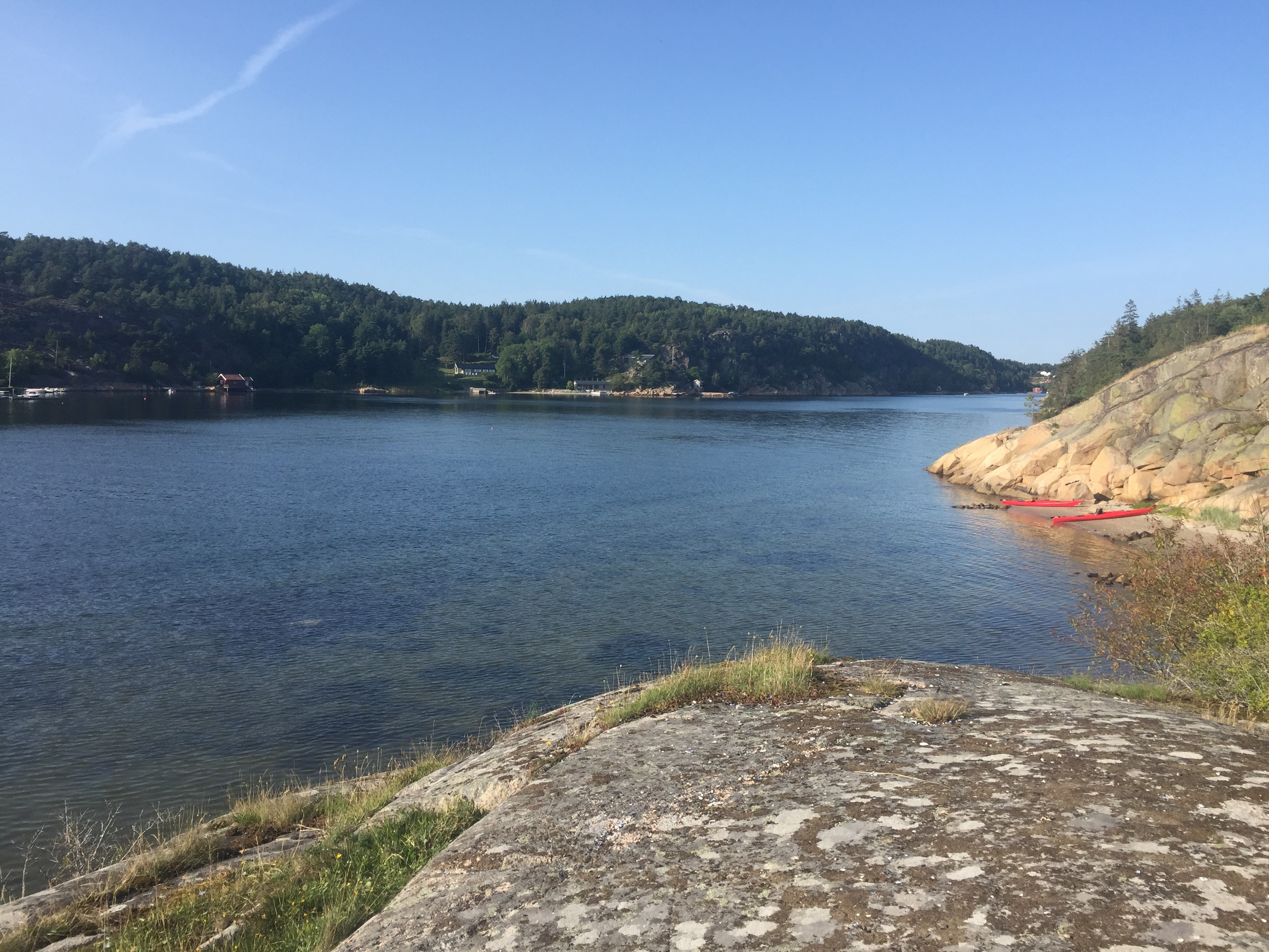 Fyldig natur